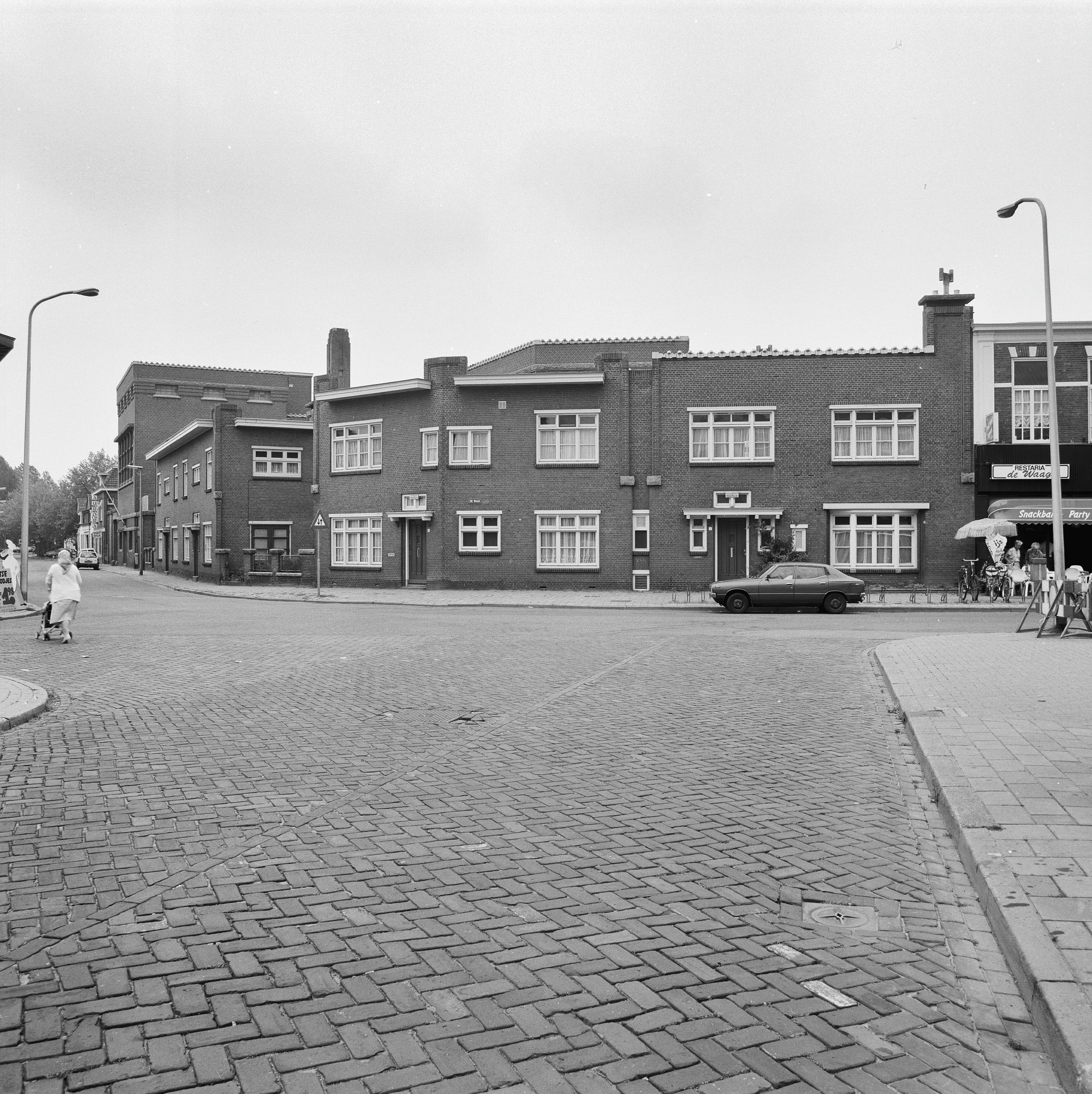 HUIS VAN BEWARING: Exterieur OVERZICHT